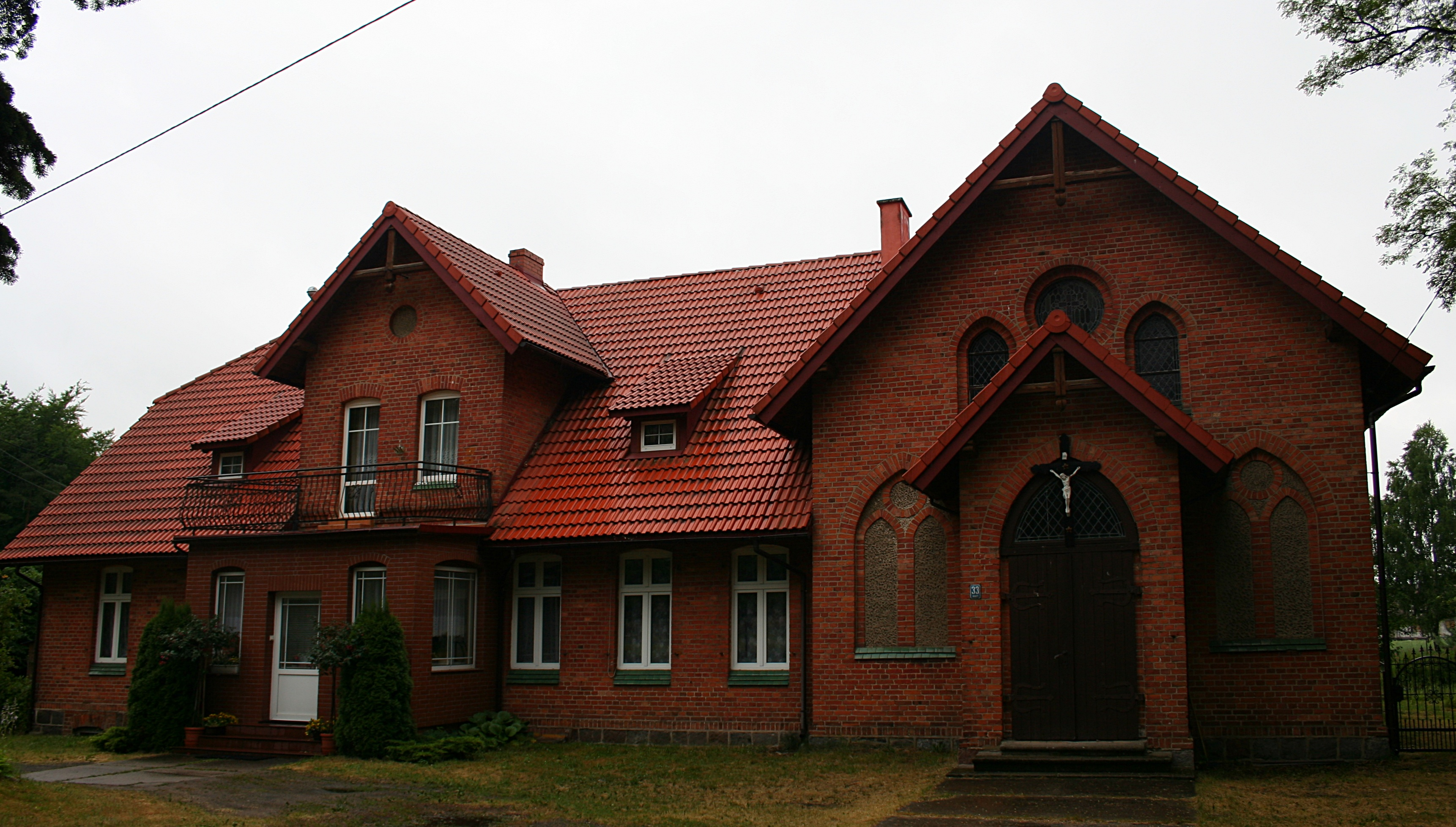 Parafia przy kościele św. Andrzeja Boboli w miejscowości Rokity, woj. pomorskie